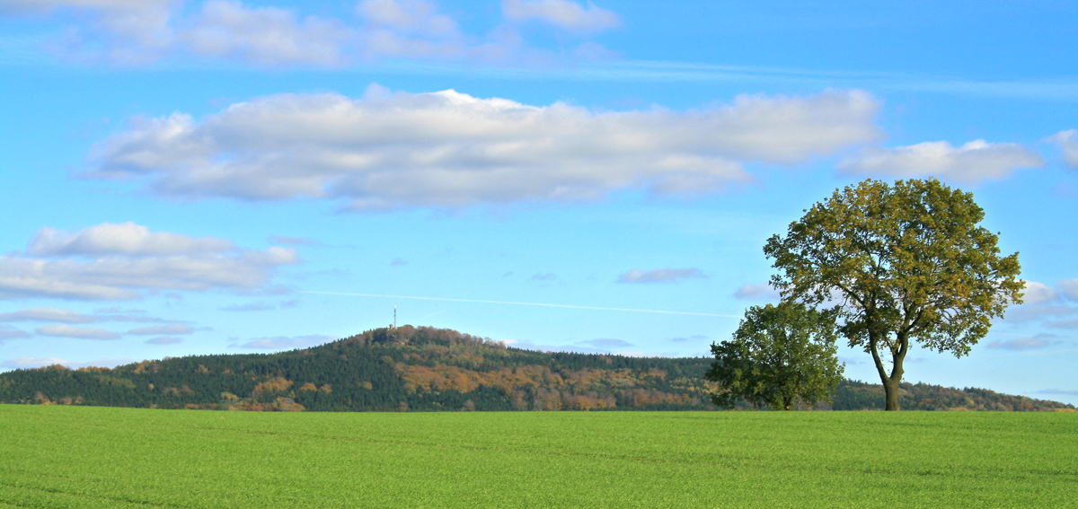 Ansicht des Kottmar von Ebersbach aus